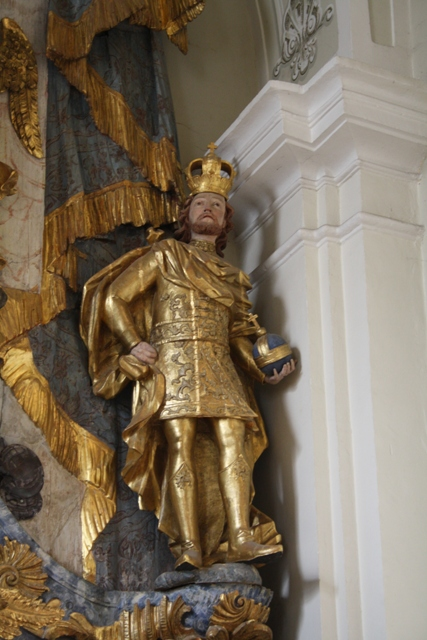 Szendrő Szent Ferenc-templom. Szent László király szobra az 1752 körül állított főoltárról.